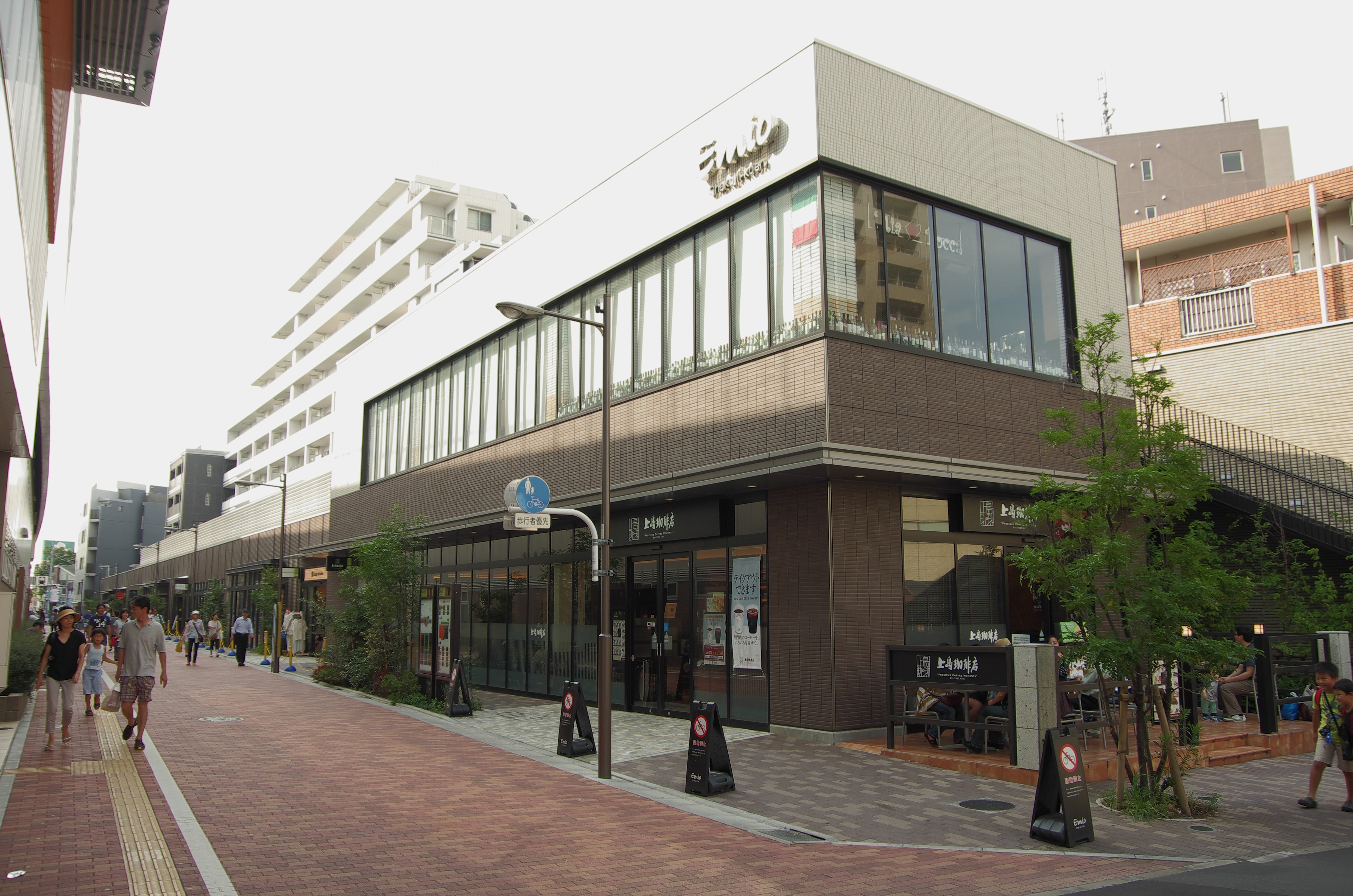 Emio石神井公園Northを東側から眺める